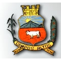 Brasão do município de Campos Altos, Minas Gerais, Brasil.